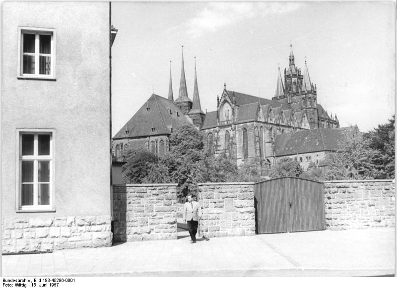 Erfurt, Dom, Severi-Kirche Zentralbild Wittig-15.6.57-Qua-L Bezirkshauptstadt Erfurt. Blick auf den Erfurter Dom und die Severi-Kirche. Im Vordergrund ein neuerbautes Priesterseminar.